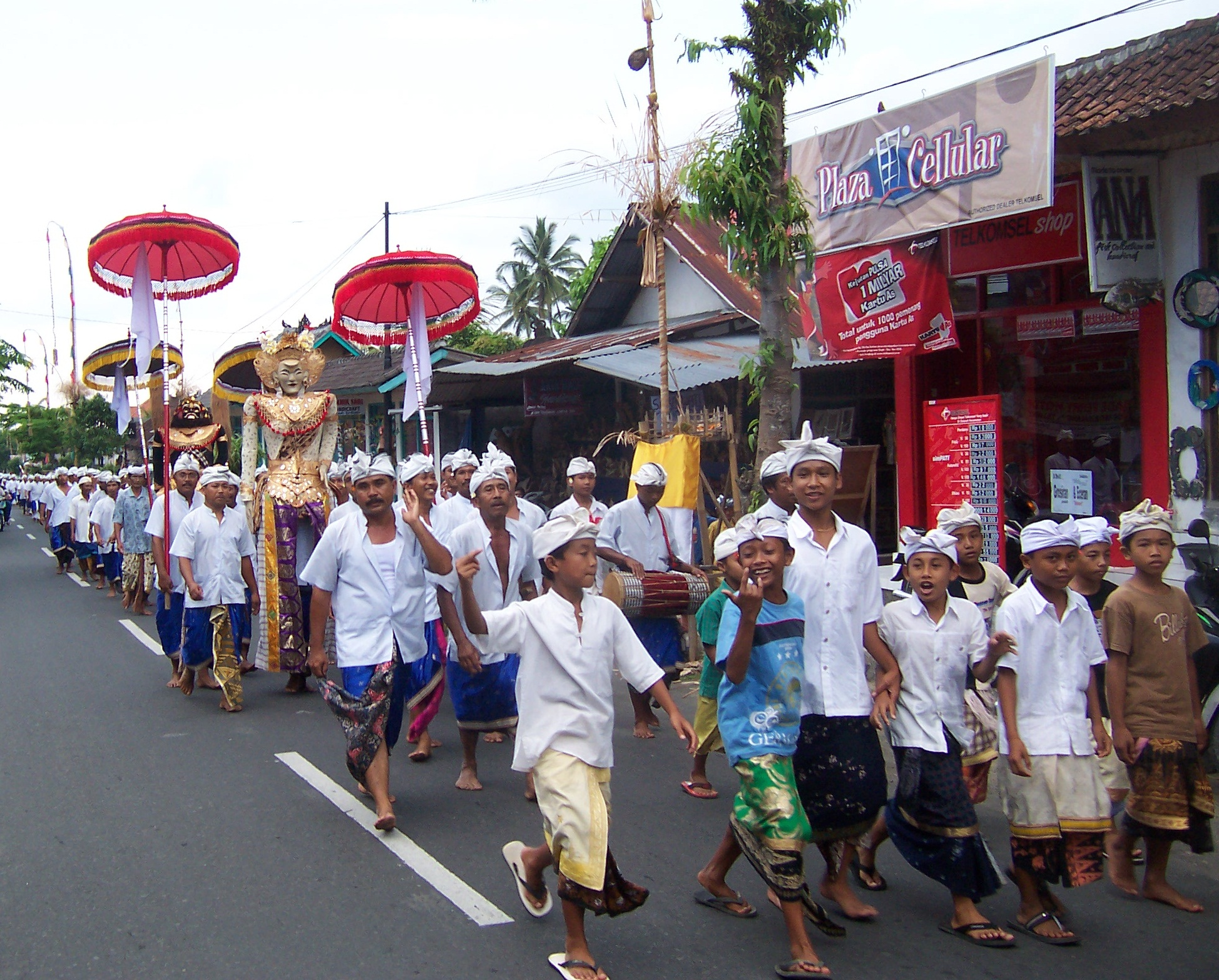 Процессия во время праздника Галунган